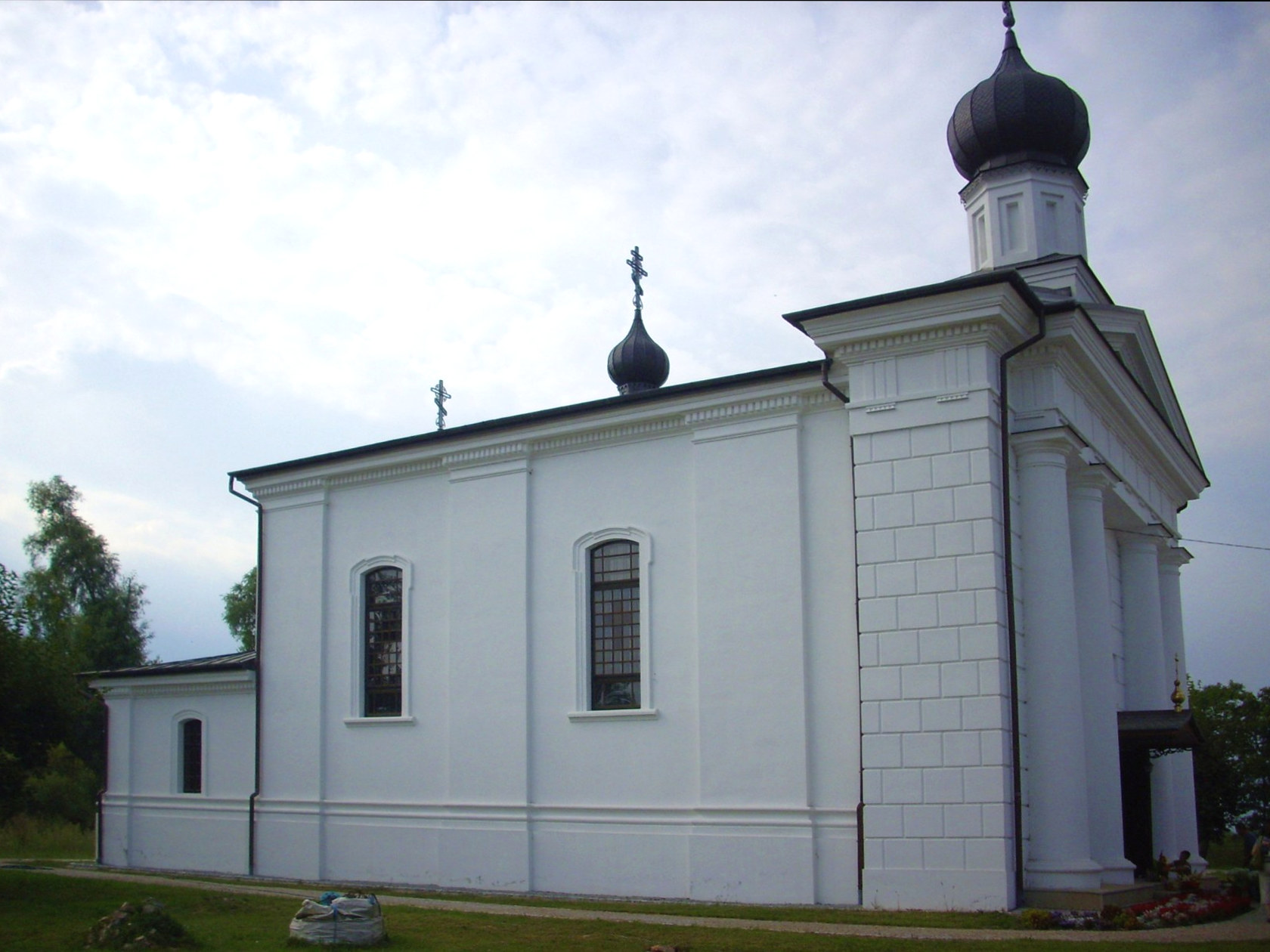 Cerkiew św. Apostoła Jana Teologa w Terespolu. 04.1958 and 25.11.1966.